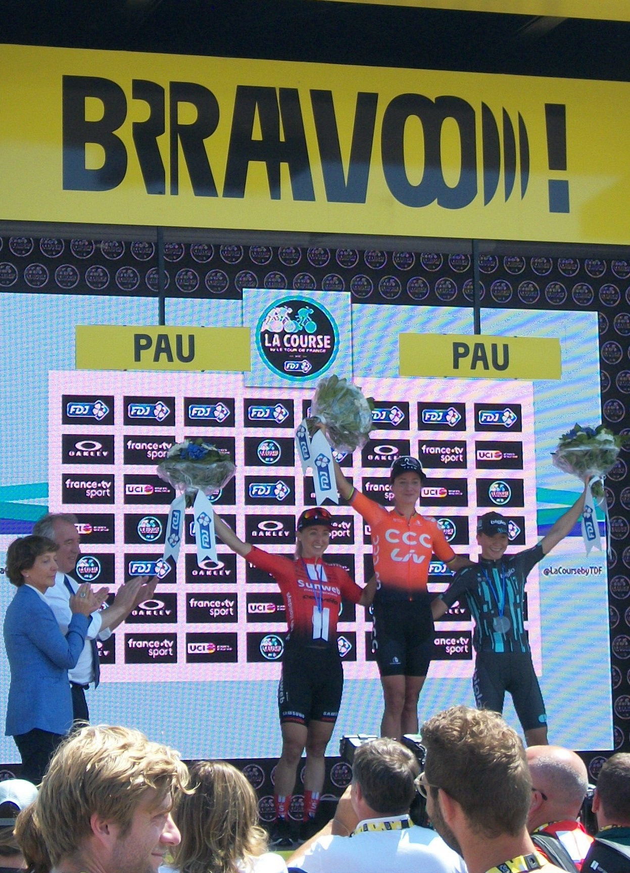 Podium de La course by Le Tour de France 2019 à Pau ː 1er ː Marianne Vos, 2ième ː Leah Kirchmann, 3ième Cecilie Uttrup Ludwig